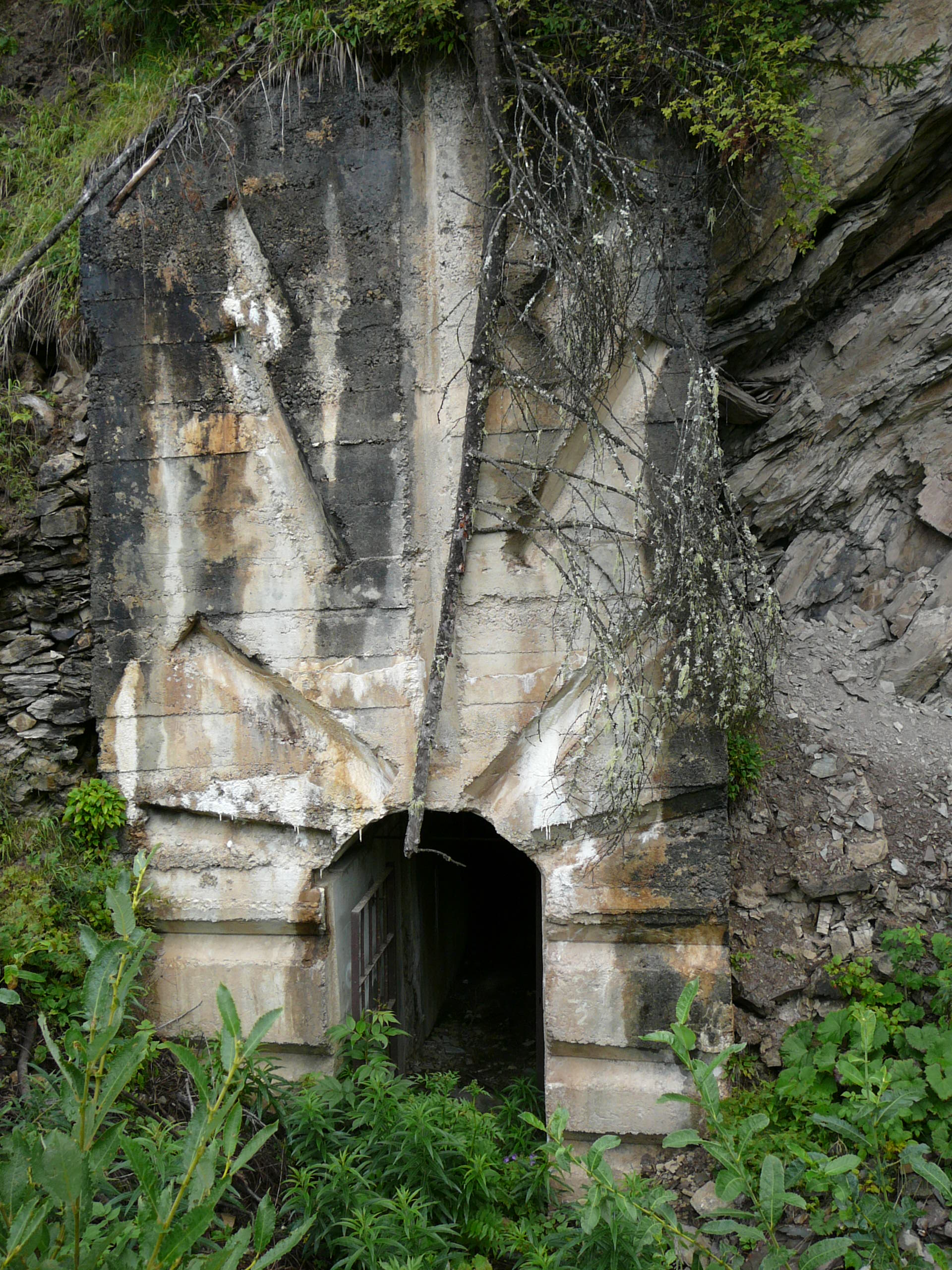 Opera 10 Dobbiaco